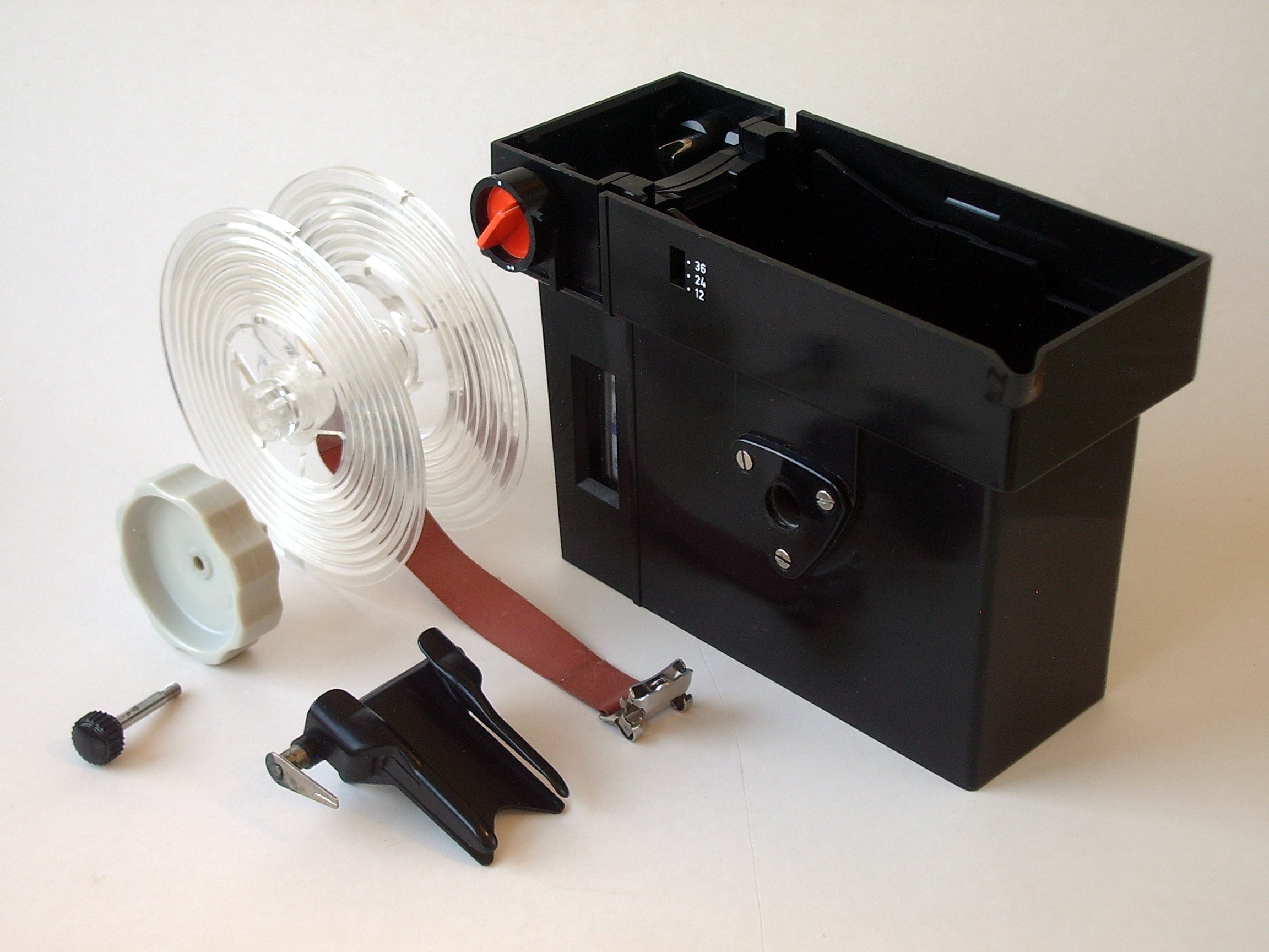 Agfa Rondinax 35 U / Einzelteile (ohne Deckel) - Agfa Rondinax 35 U in parts